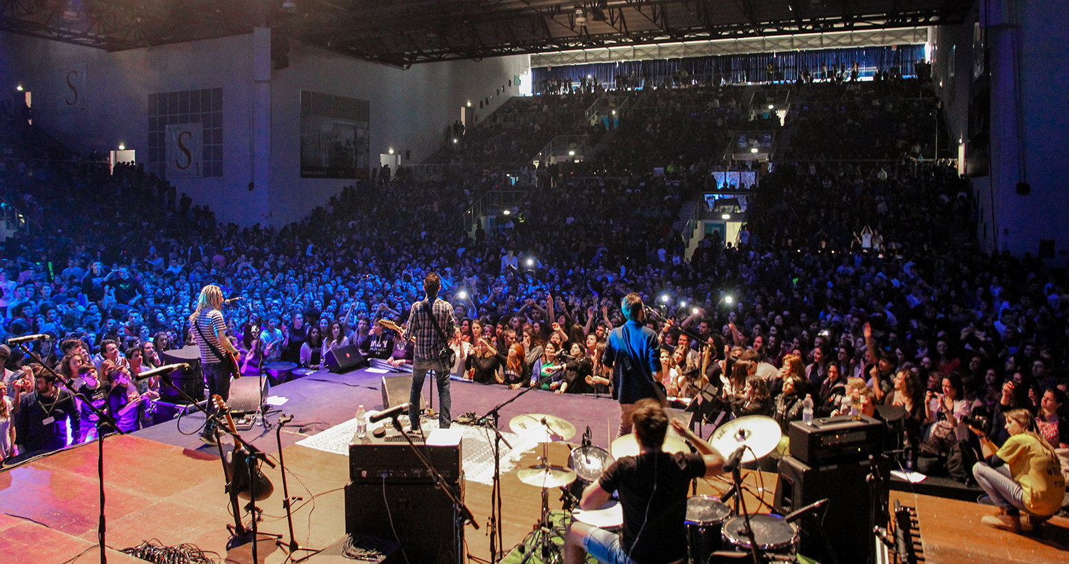 Performance live The Sun @ Pala Arrex di Jesolo (VE)